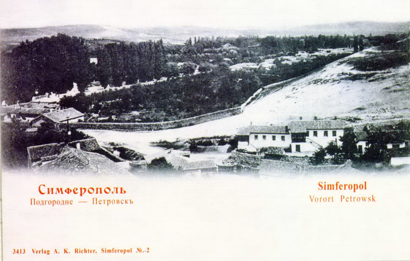 Подгородне-Петровское. Открытка начала XX века